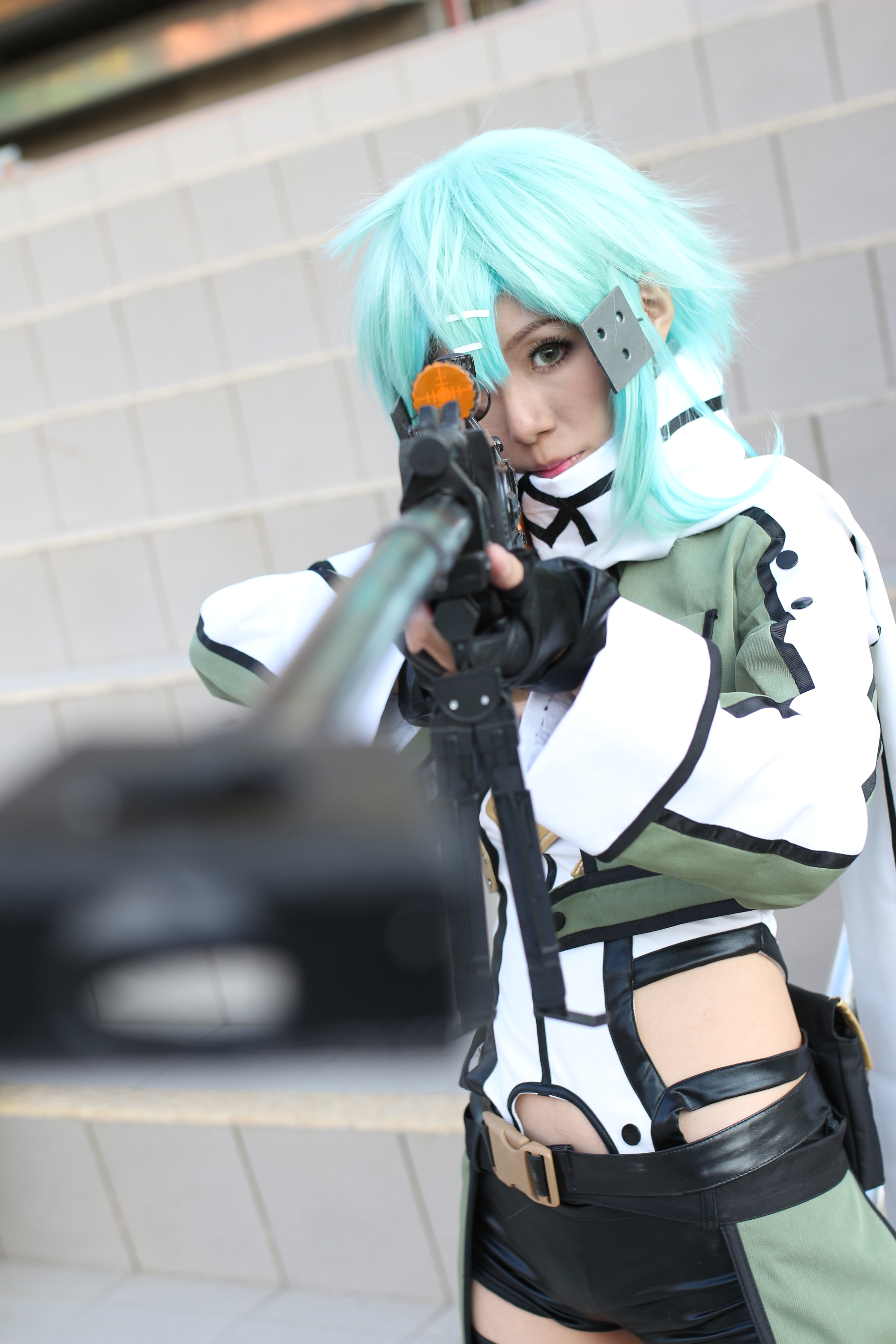 第4屆南方理想國動漫嘉年華，《刀劍神域II》詩乃cosplayer。